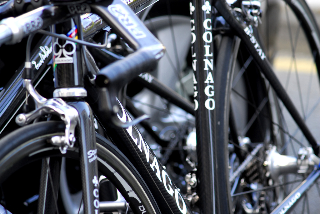 Rabobank's Colnago bikes